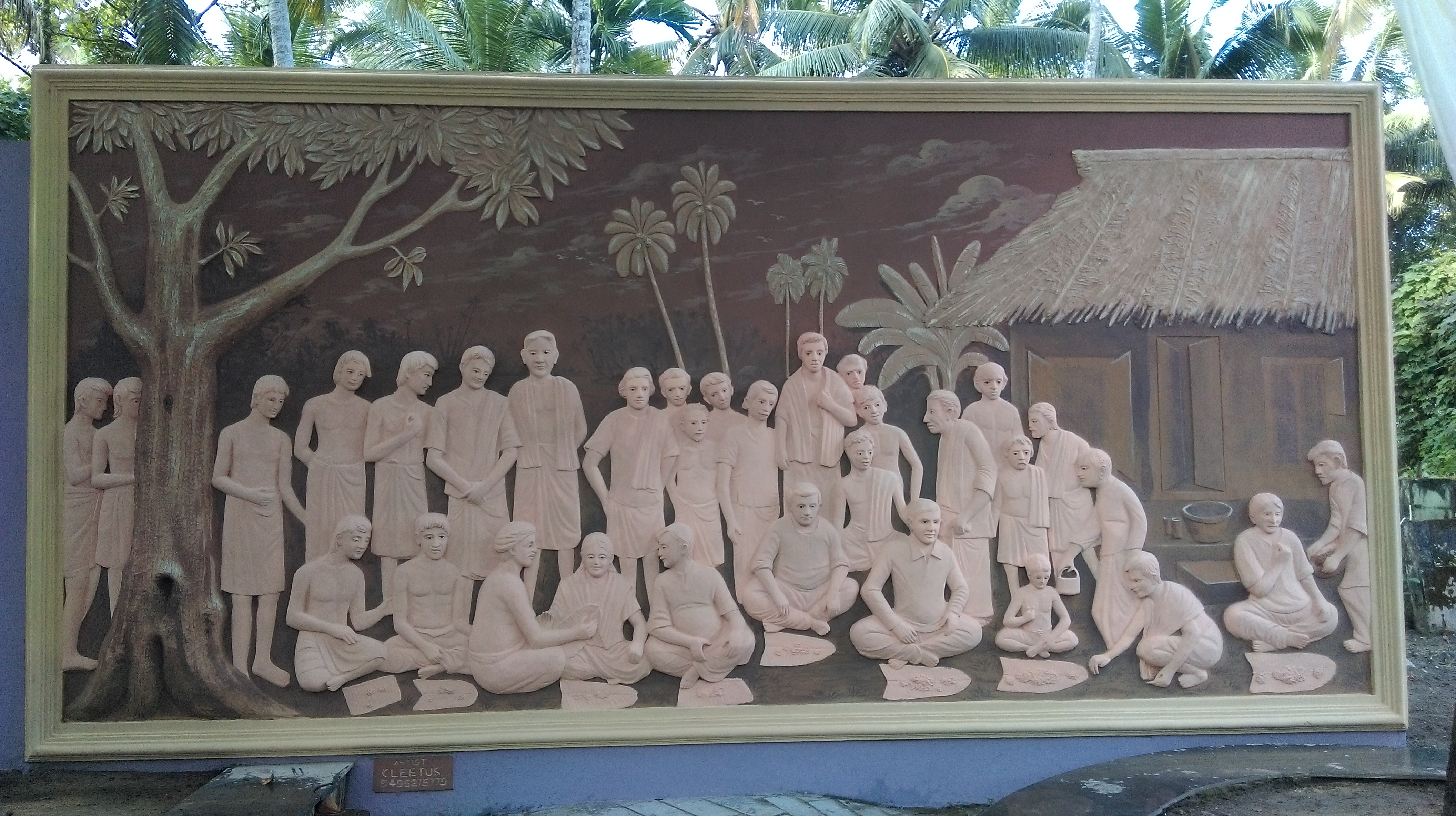 സഹോദരന്‍ അയ്യപ്പന്‍ ജന്മഗൃഹ പരിസരത്തെ മിശ്രഭോജന ശില്‍പമതില്‍